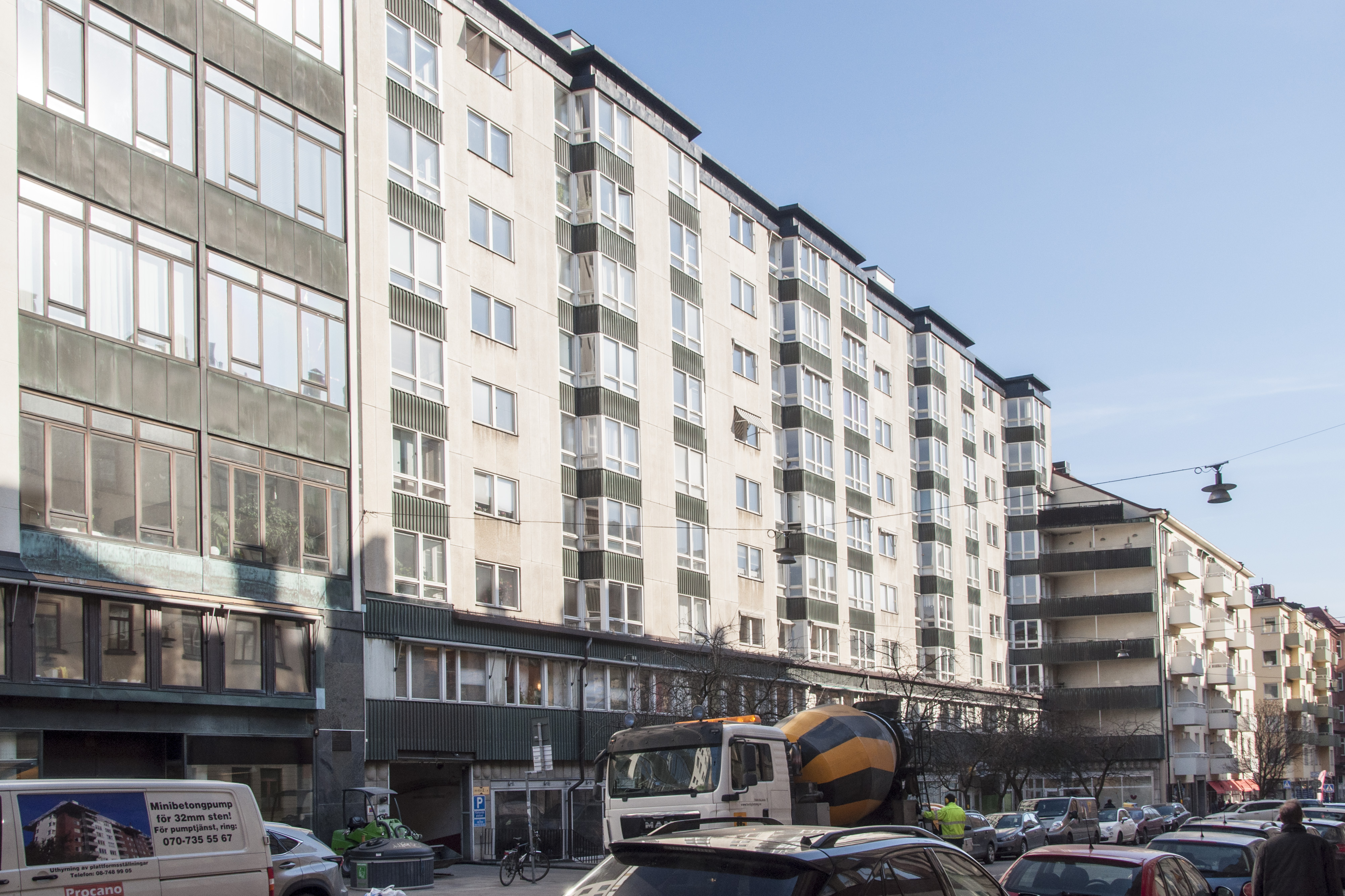 Geten 25, Döbelnsgatan 52-54, Nybyggnadsår 1963 - 1969, Eric Ahlin (Arkitekt) Ohlsson & Skarne (Byggmästare) Ohlsson & Skarne (Byggherre)